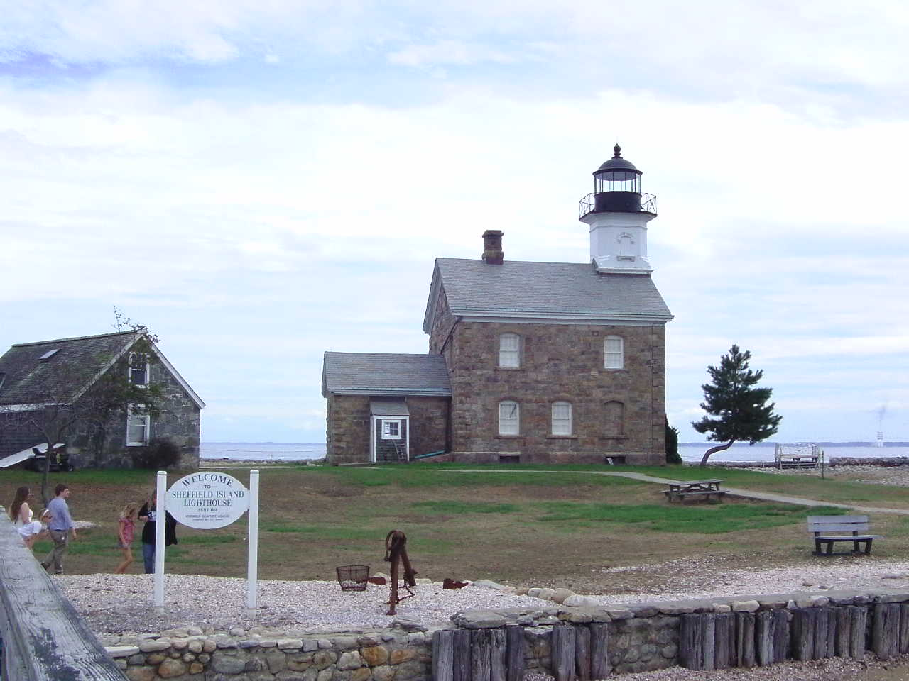 Leuchtturm auf Sheffield Island, Connecticut, USA